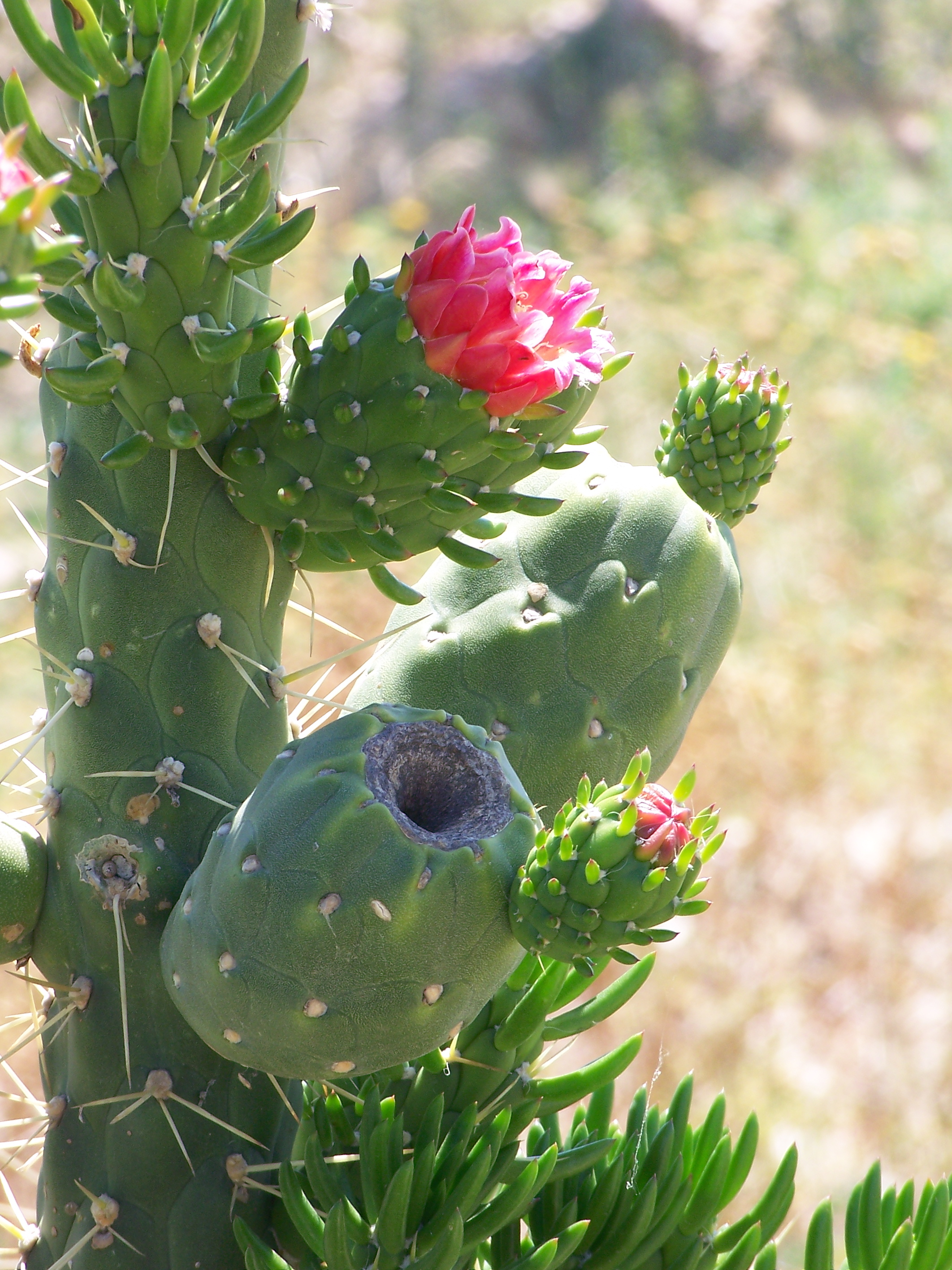 Cylindropuntia imbricata: flores - Rambla de La Algüeda, Albatera (Alicante, España).